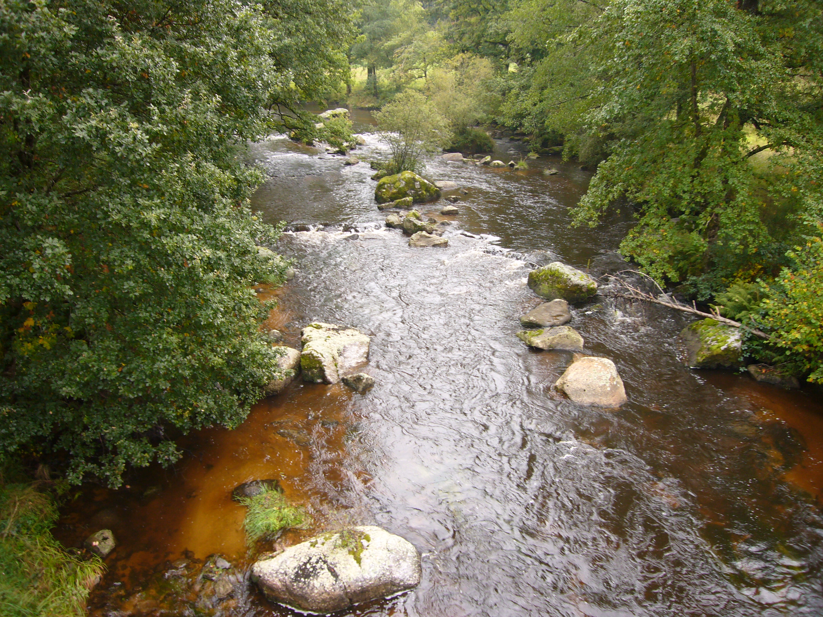 La Vienne près de Rempnat, 87, France